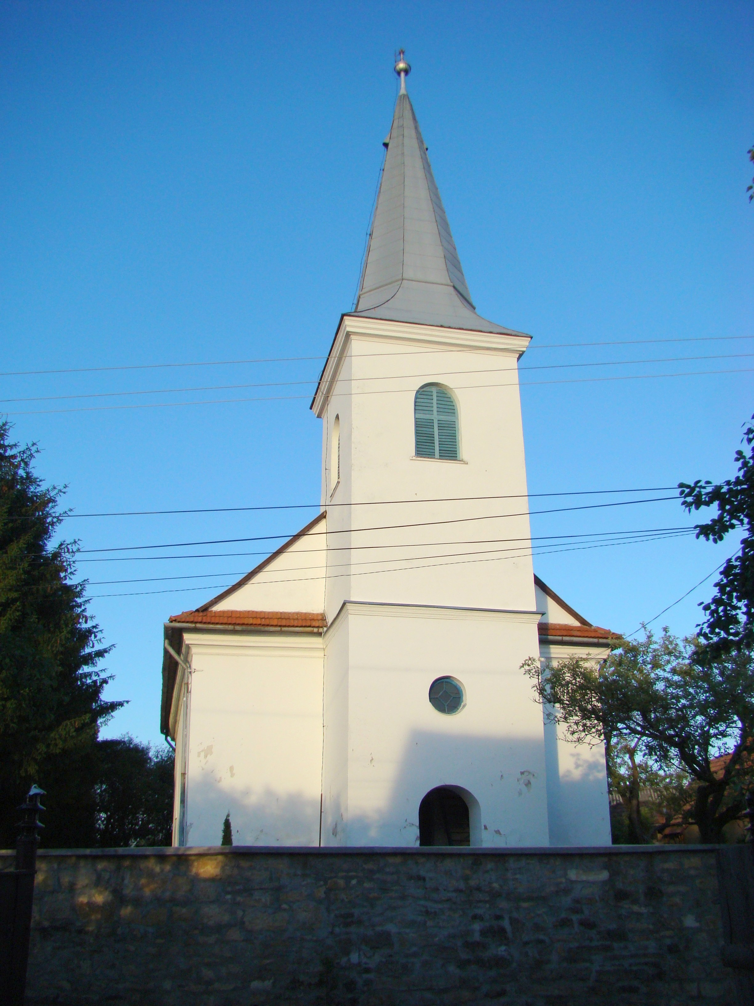 Biserica reformată, sat DUMBRAVA; comuna CĂPUŞU MARE, județul Cluj